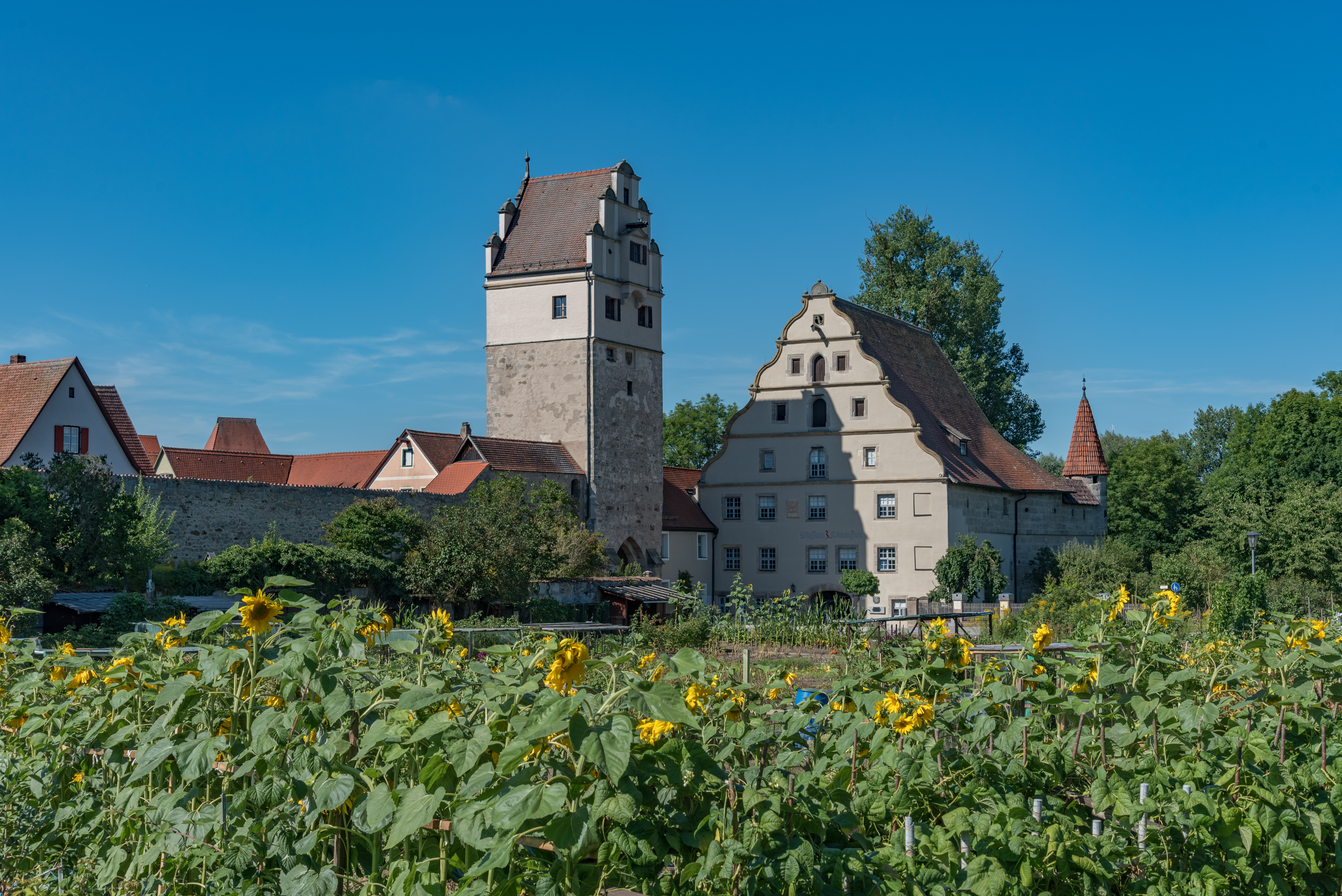 Dinkelsbühl, Stadtbefestigung, Nördlinger Tor